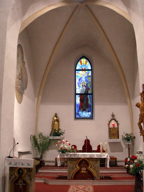 Interiér kostola obec Jaklovce, okres Gelnica, región Spiš